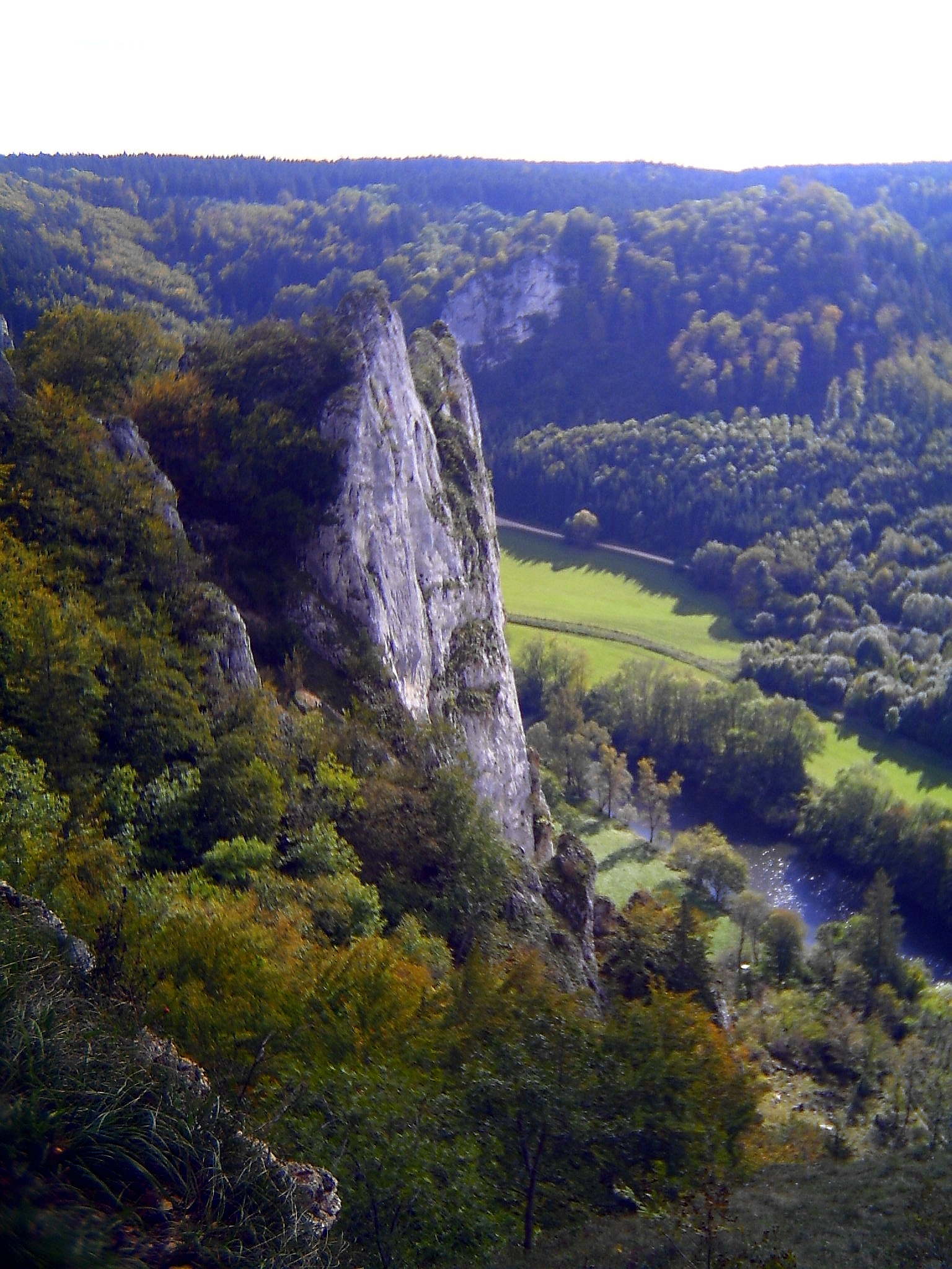 Fridingen, The rock Stiegelefelsen